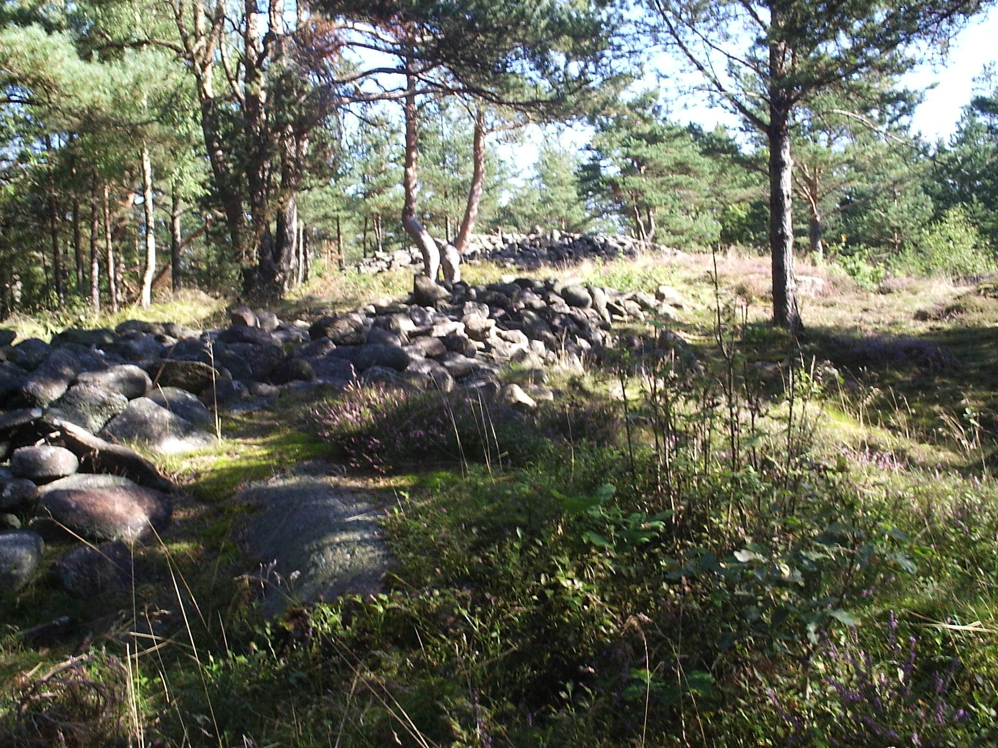 "Skändla rös", två monumentala rösen från bronsåldern på Skändlaberget på Hisingen i Göteborgs kommun. Bilden är tagen av Harri Blomberg.